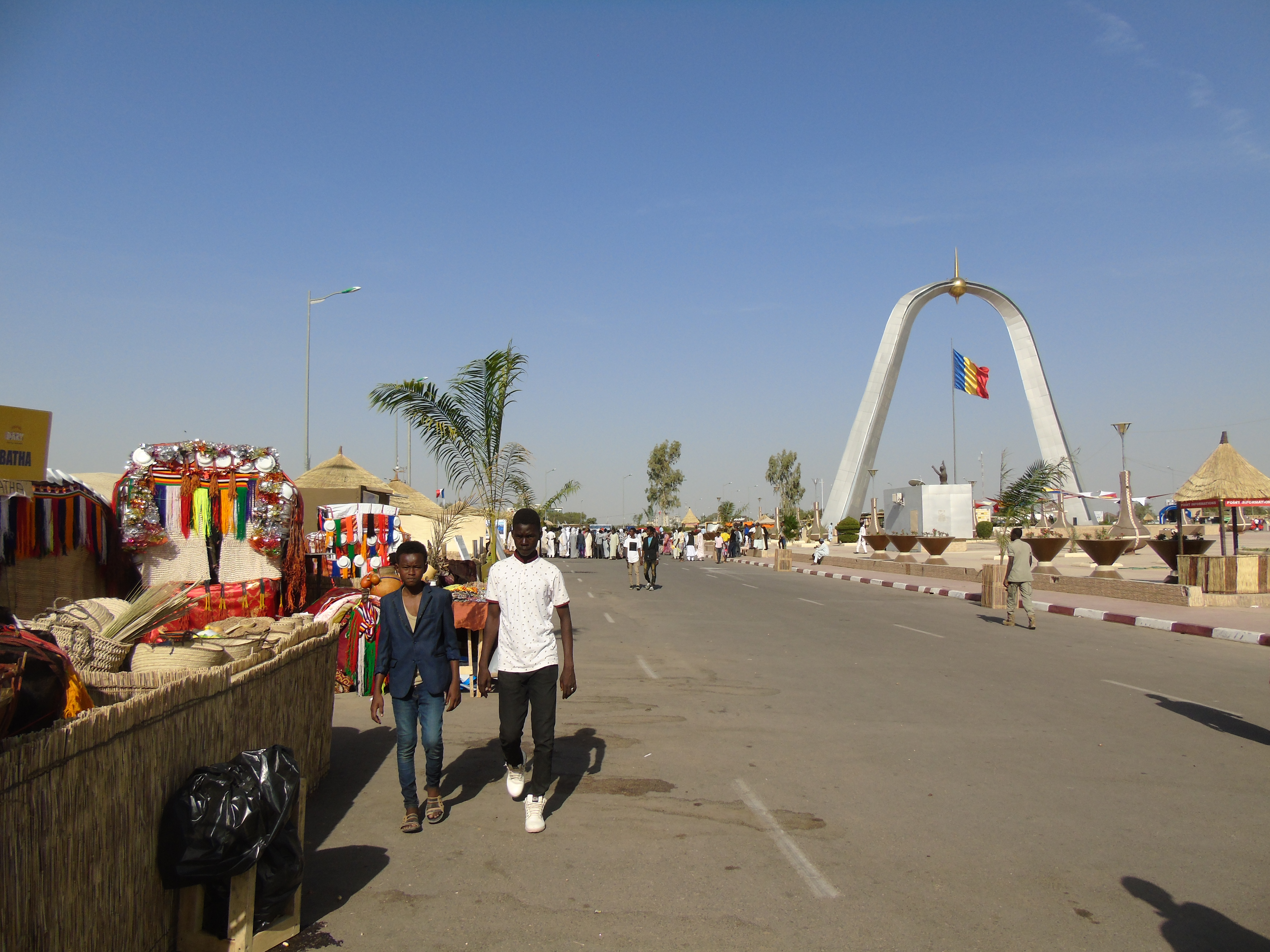 Place de la nation lors du festival Dary, édition 2018